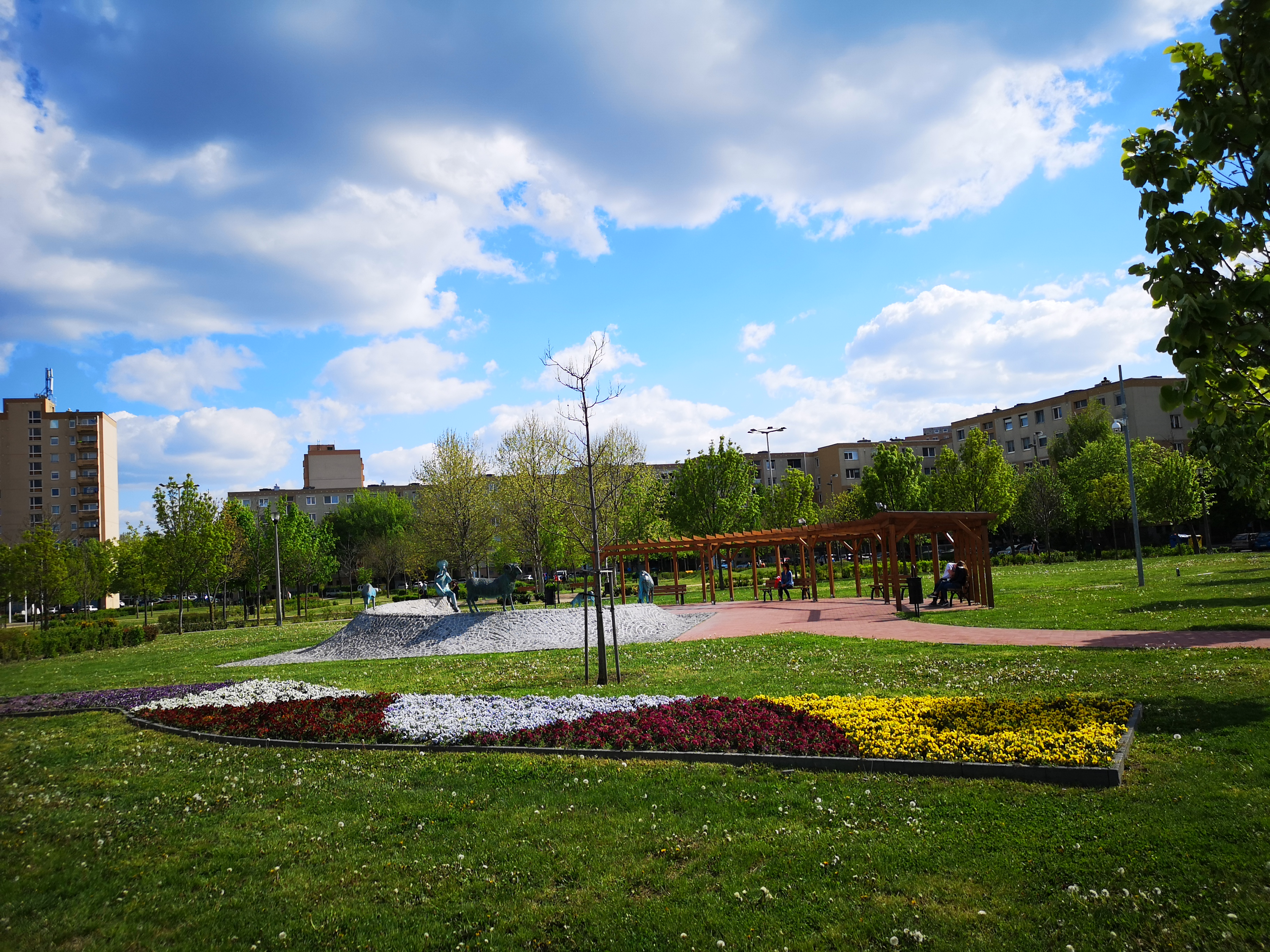 Petőfi park, Székesfehérvár